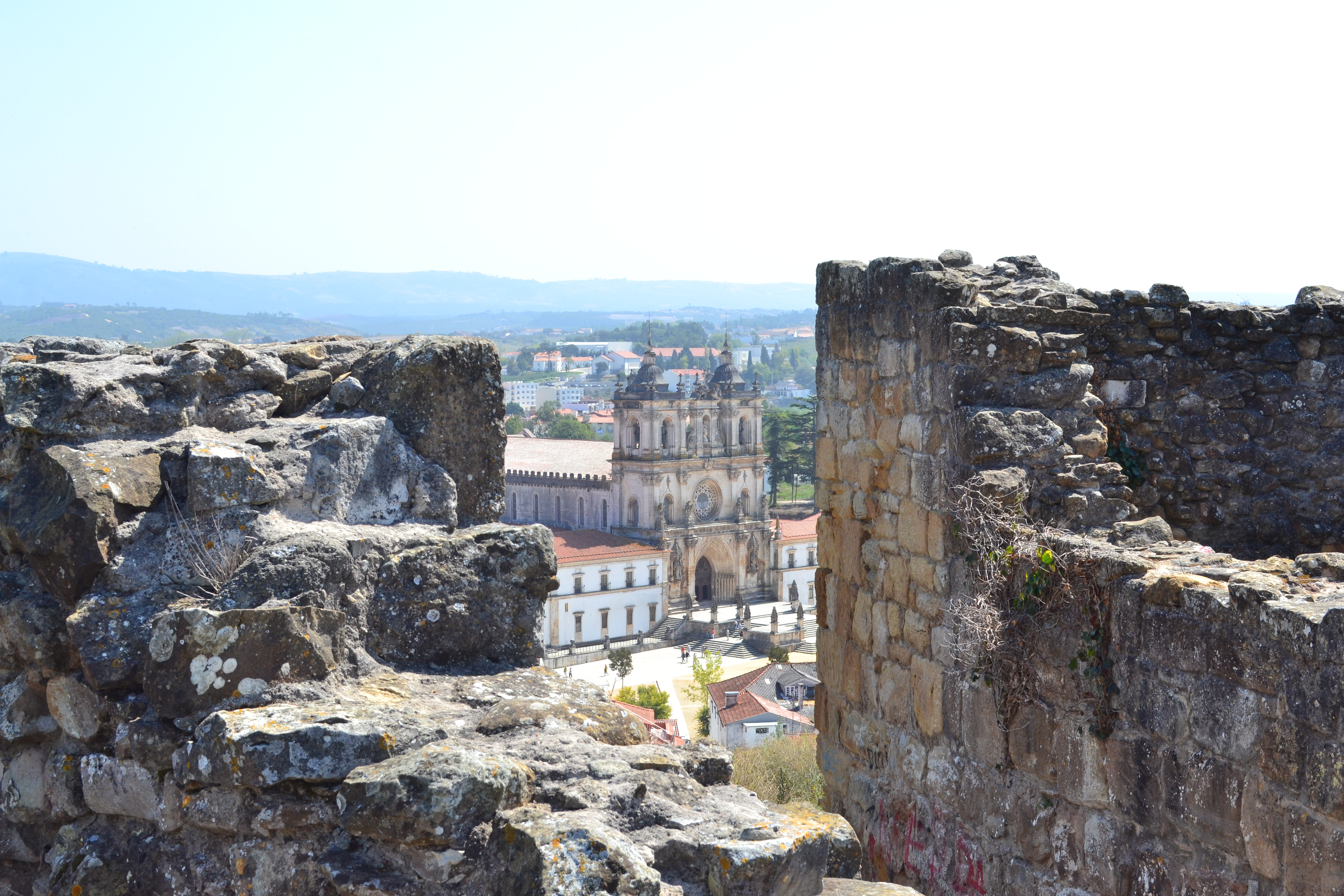 Ruínas Castelo Alcobaça - vista para o Mosteiro